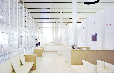 刈田綜合病院受付